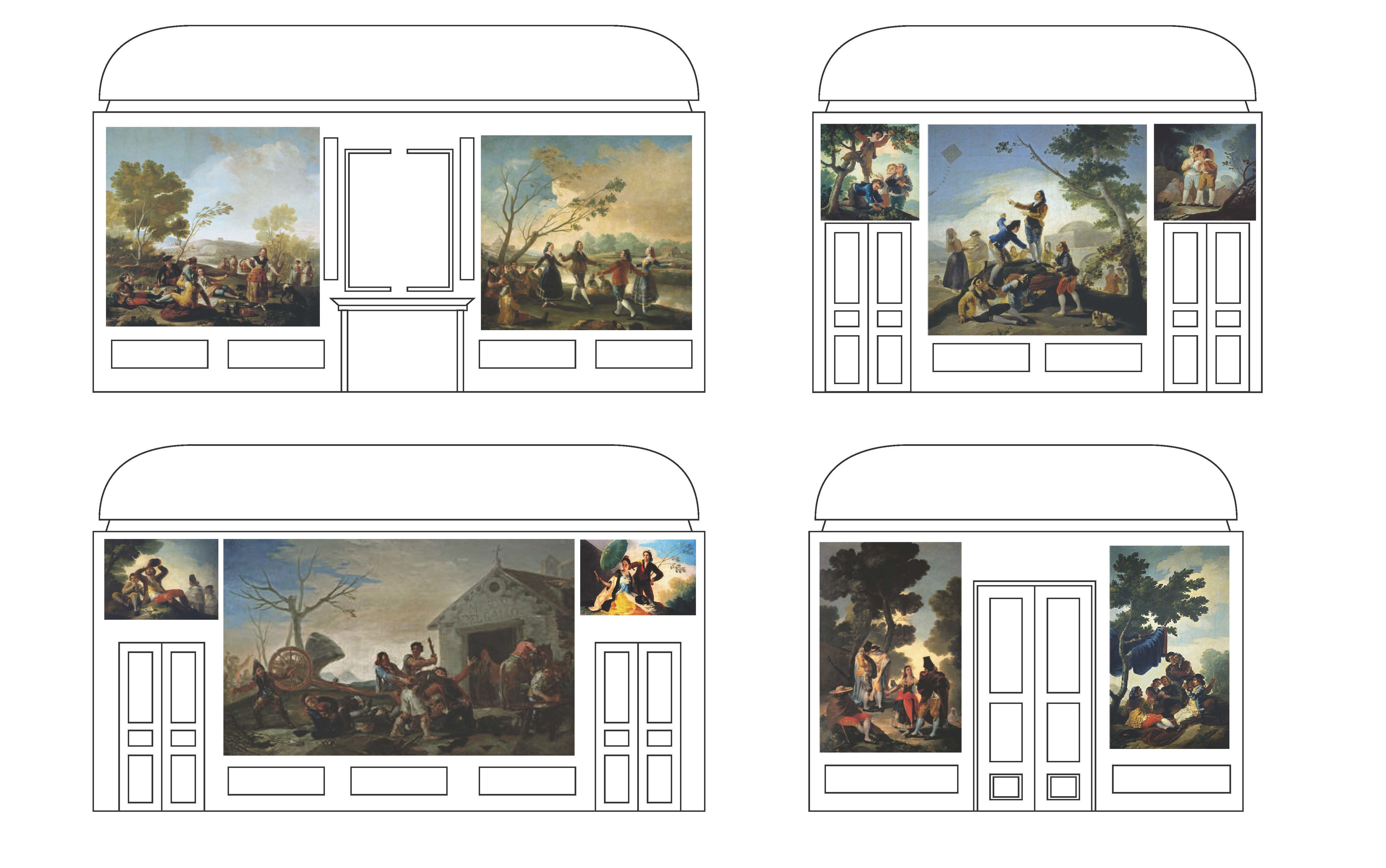 Disposición original de los Cartones de Goya en cada una de las Paredes